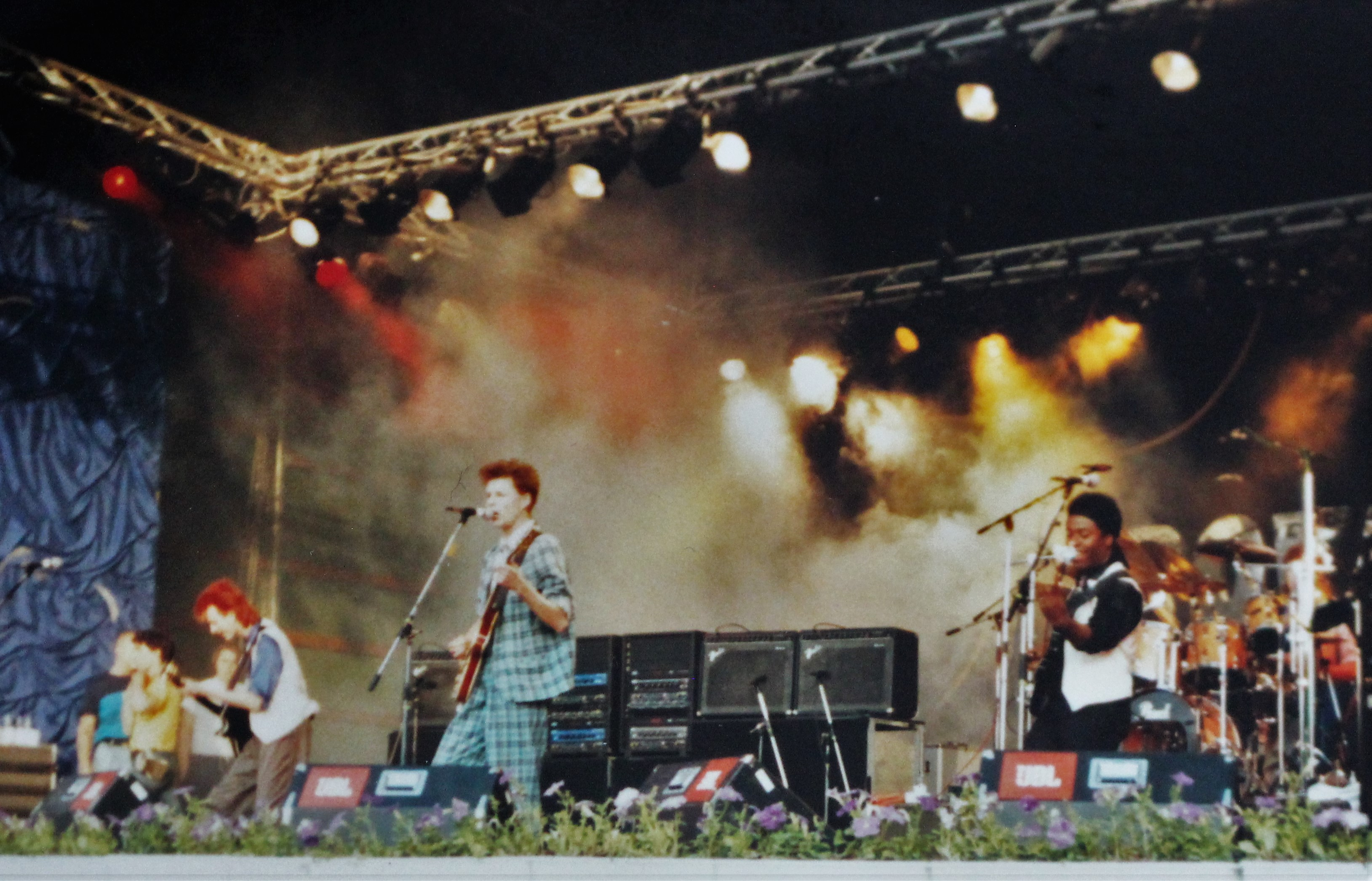 Big Country Provinssirokissa vuonna 1986.